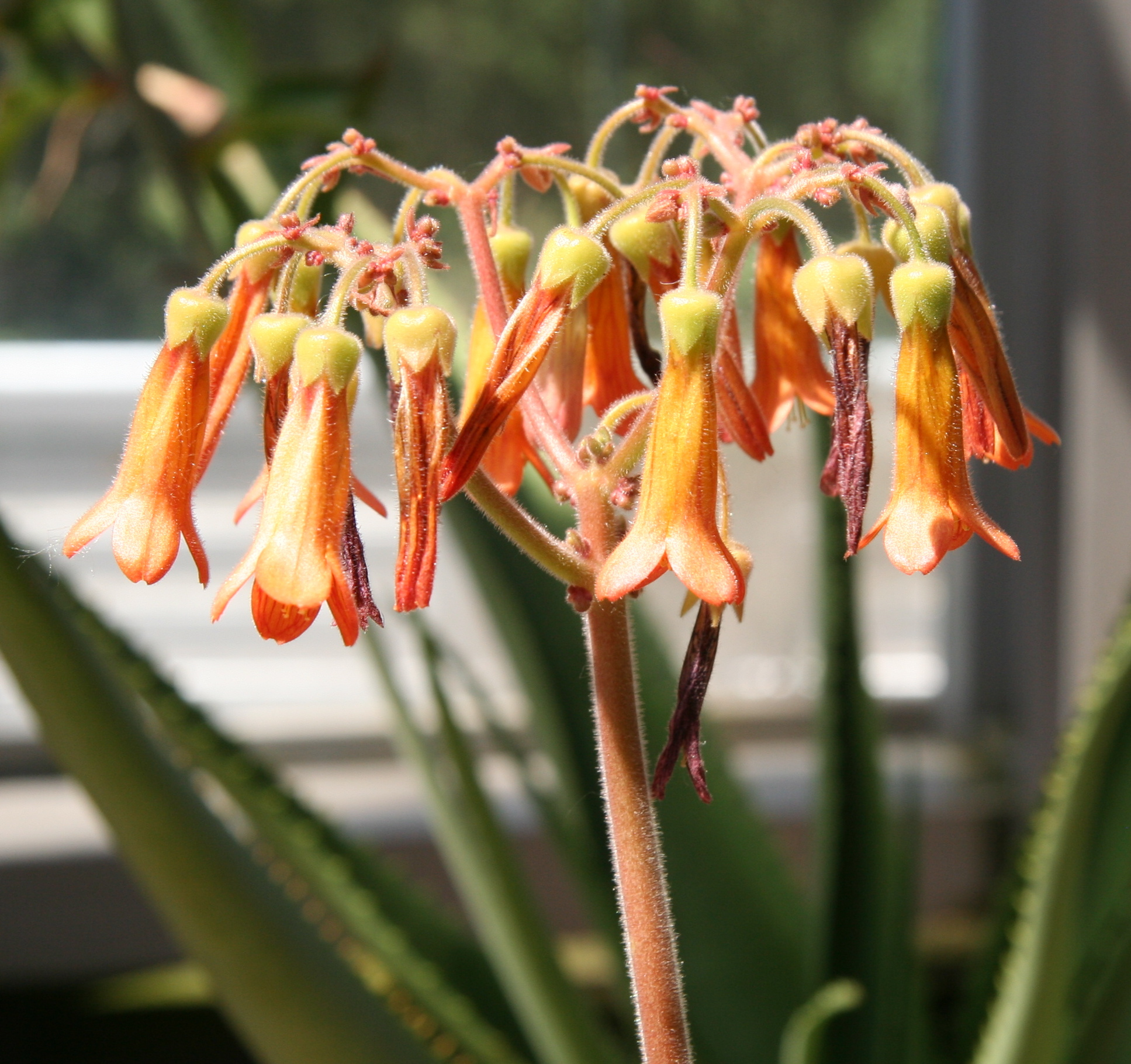 Kalanchoe pubescens im Botanischen Garten Berlin